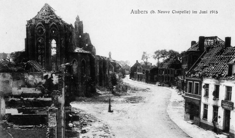 Aubers (b. Neuve Chapelle) im Juni 1915